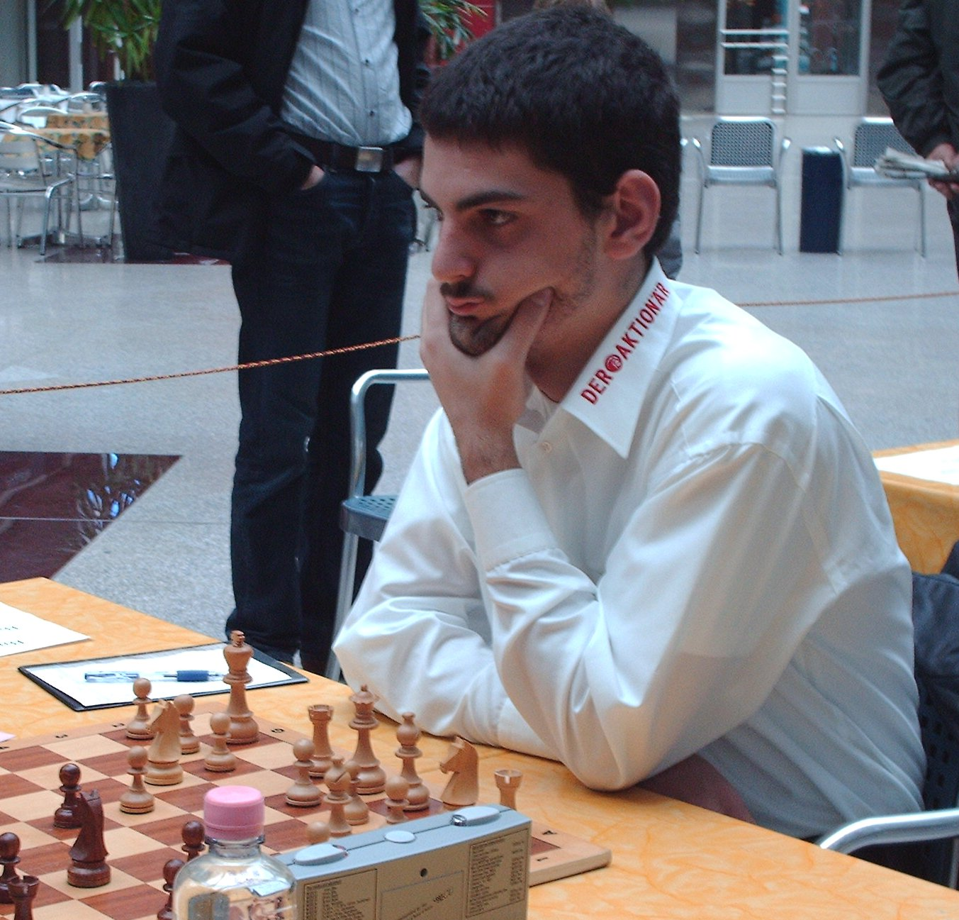 David Baramidze am 19. November 2006 bei einem Bundesliga-Wettkampf in Berlin-Tegel